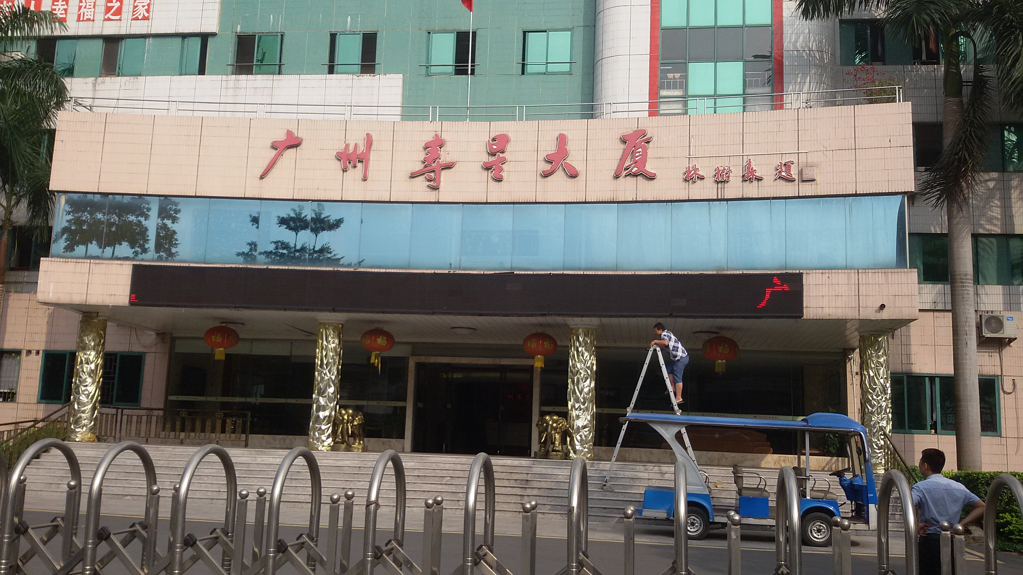 粵語: 广州寿星大厦